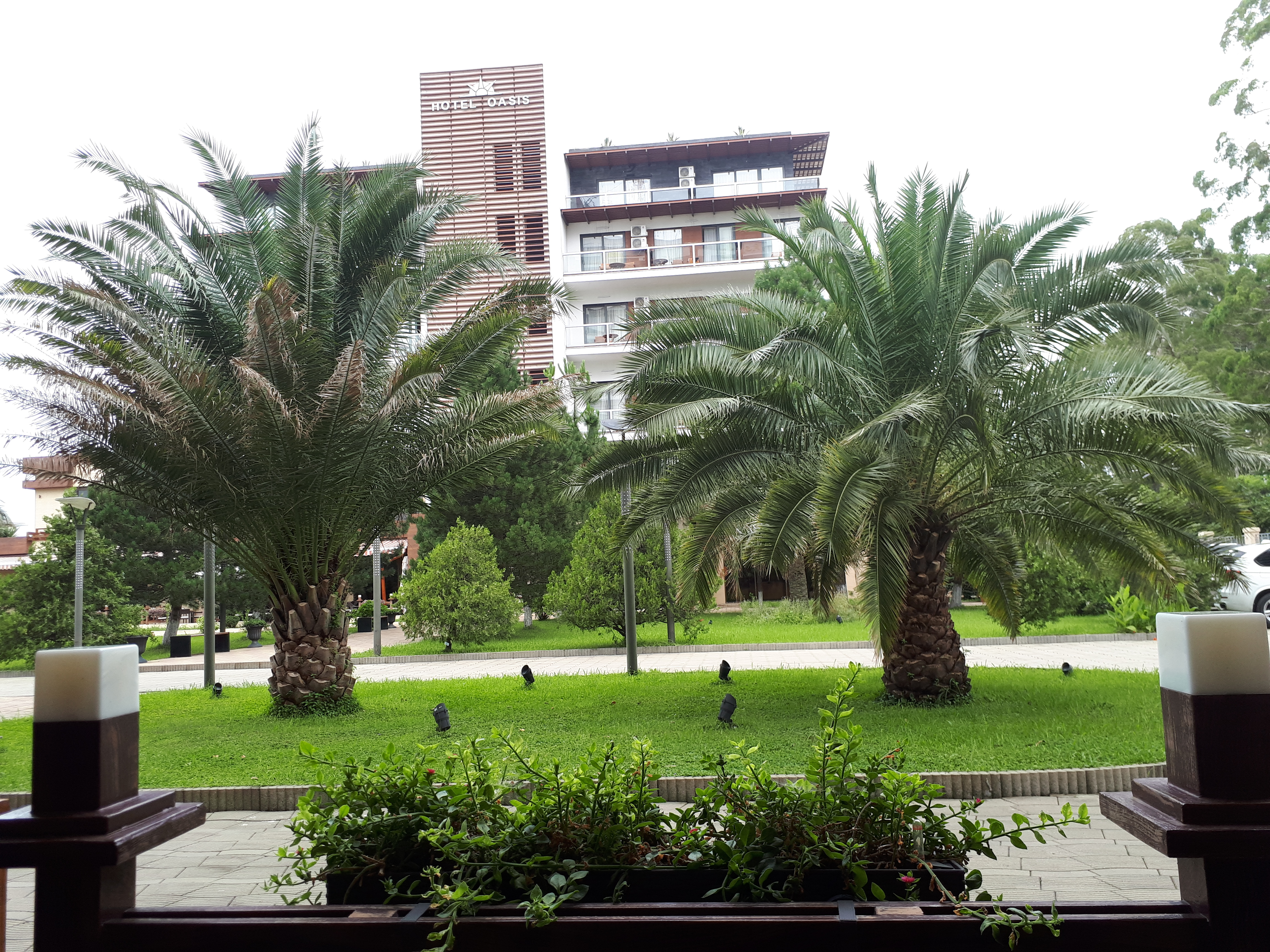 Օազիս